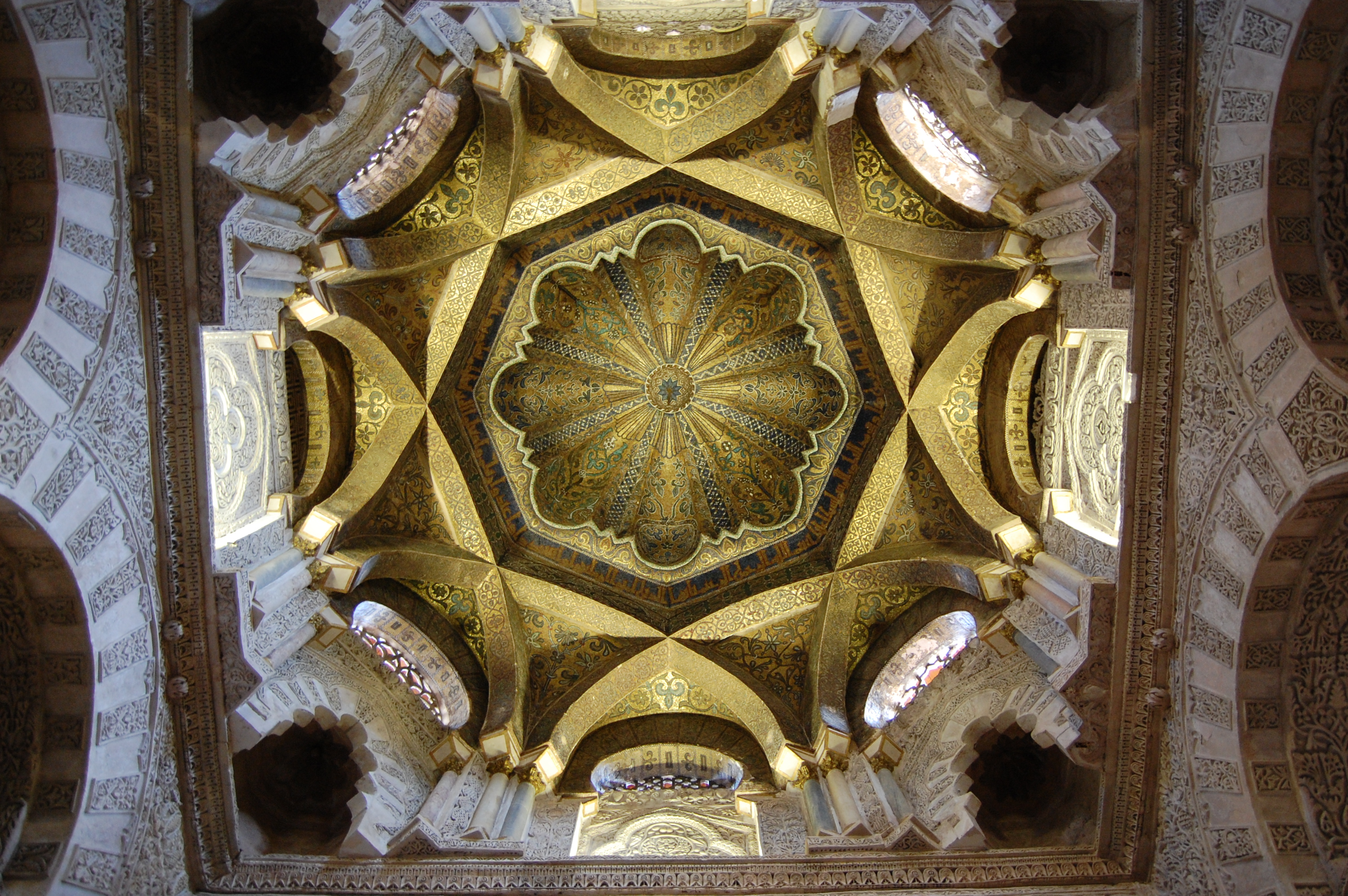 Mezquita de Córdoba. Bóveda de la macsura.